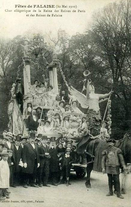 Le Char allégorique de la Reine des Reines de Paris, à Falaise le 22 mai 1910 et portant la Reine des Reines de Paris et les Reines de Falaise.